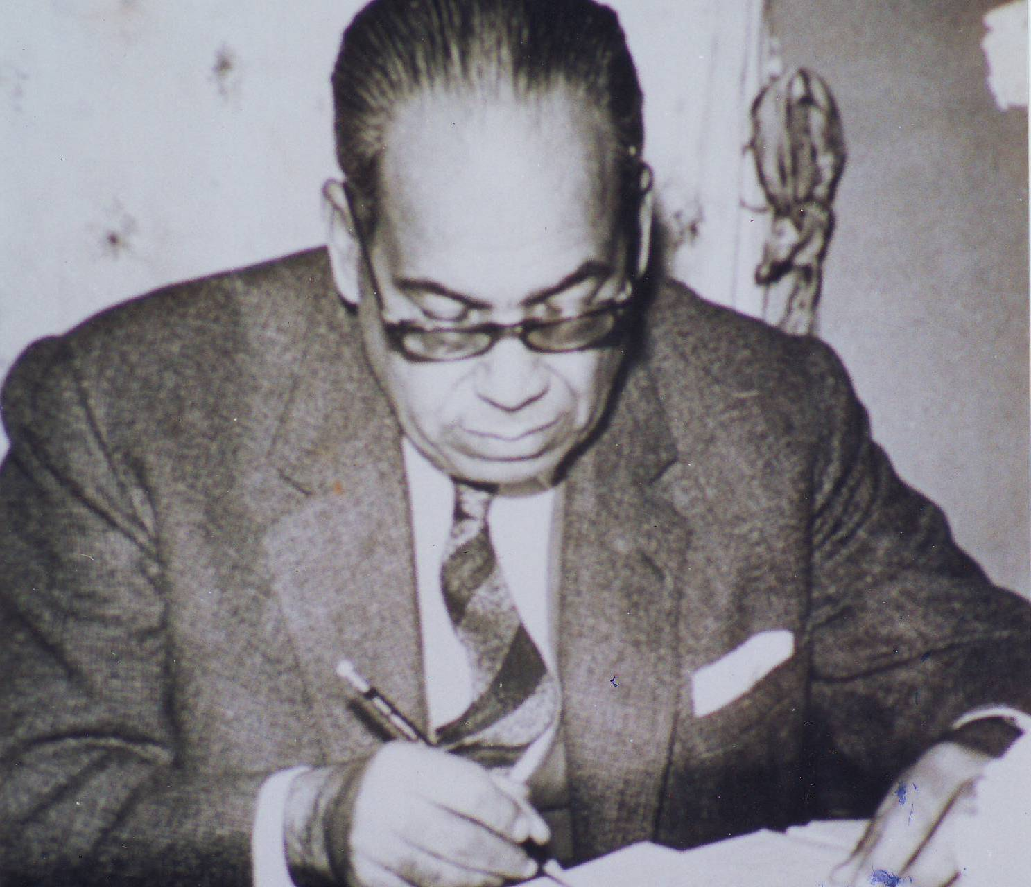 Abo El Seoud El Ebiary